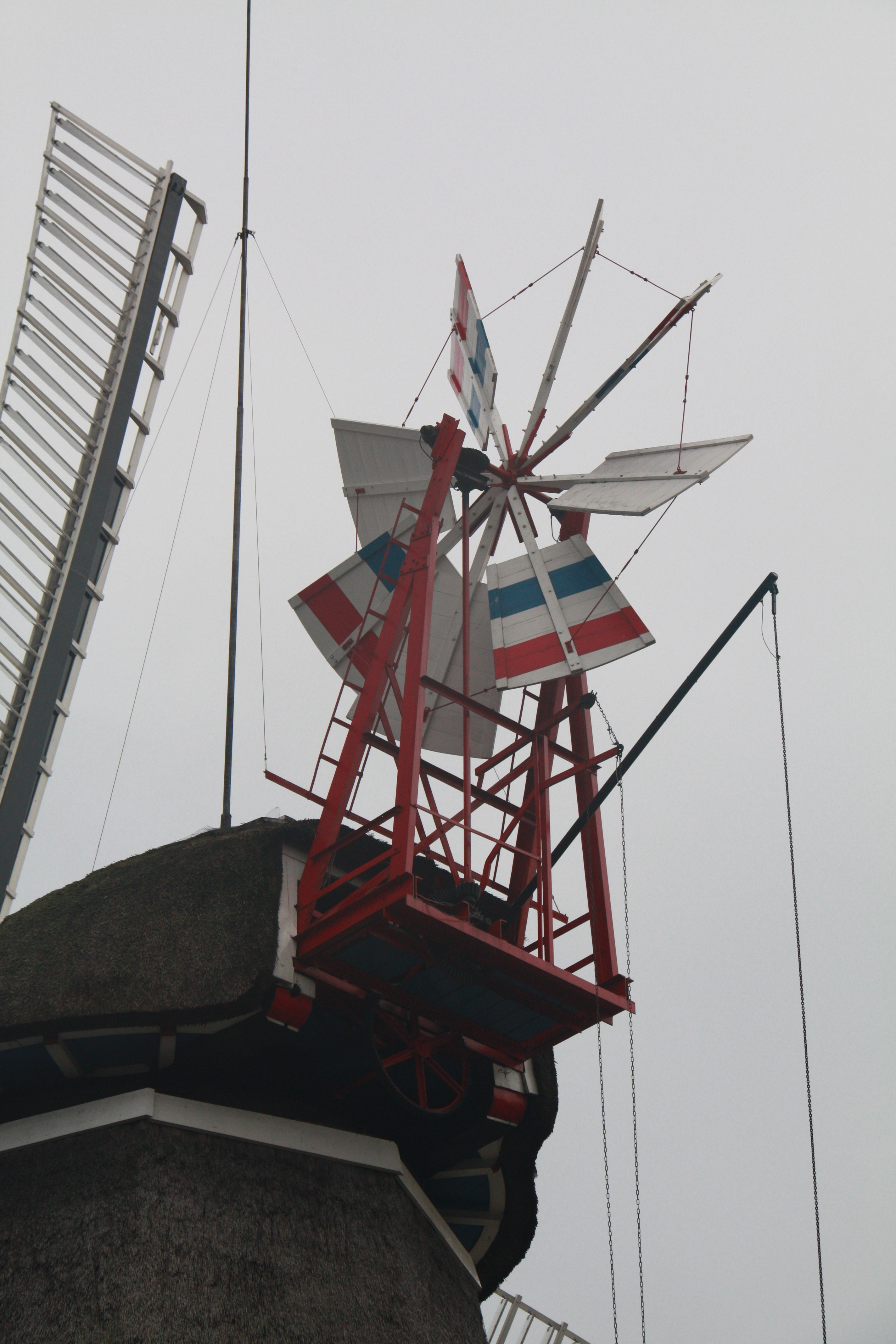 De Sterrenberg